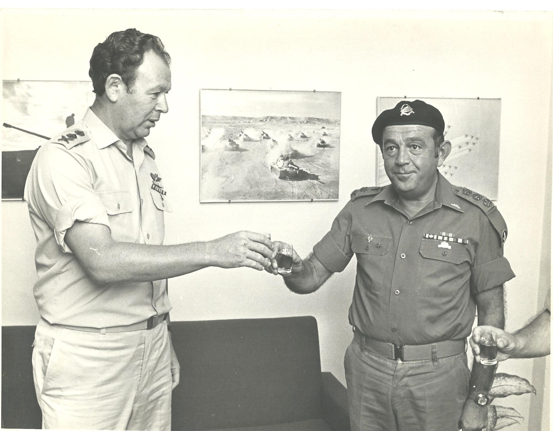 טקס קבלת דרגה